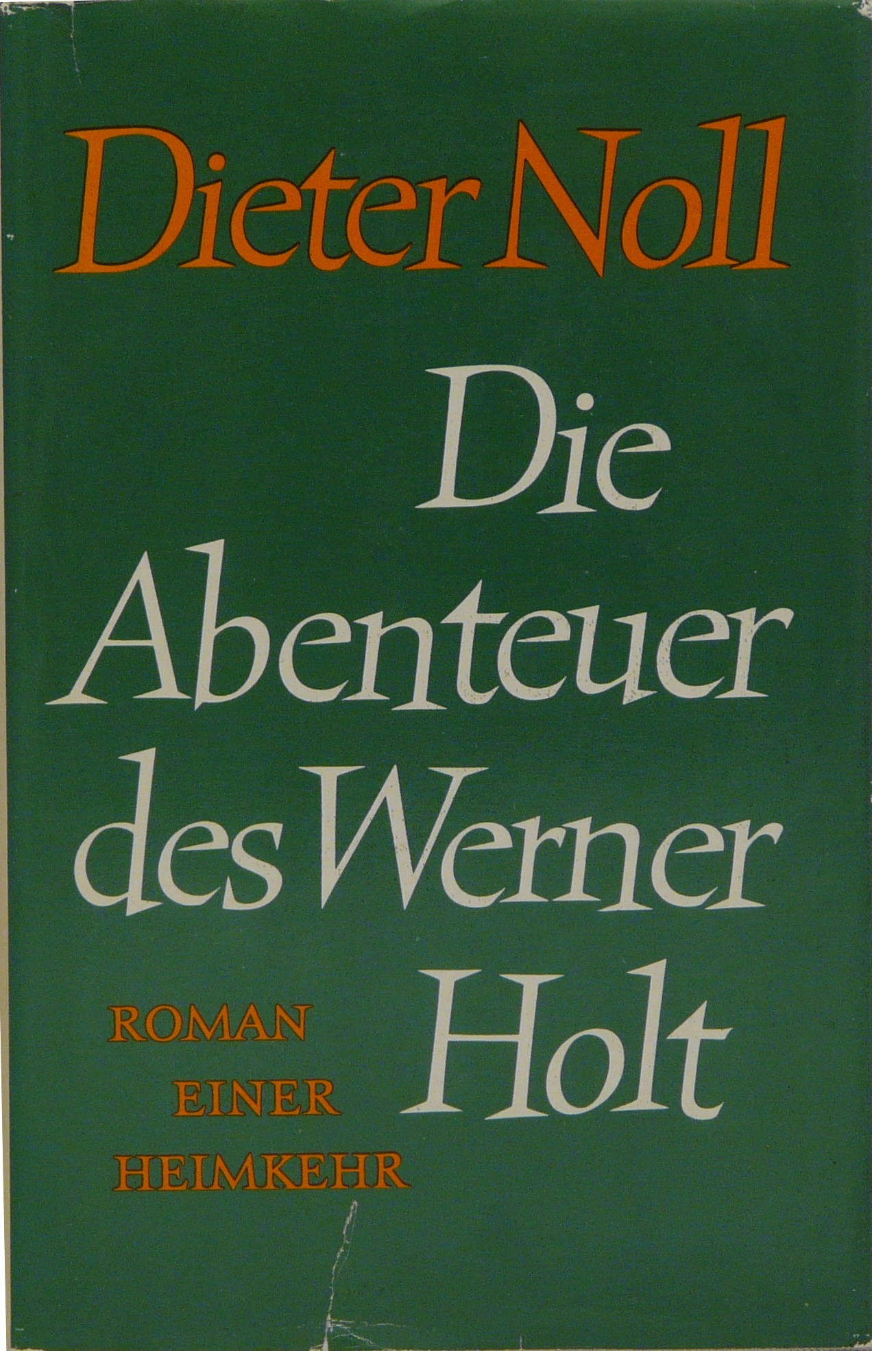 Umschlag: Die Abenteuer des Werner Holt - Roman einer Heimkehr, 24. Auflage 1986